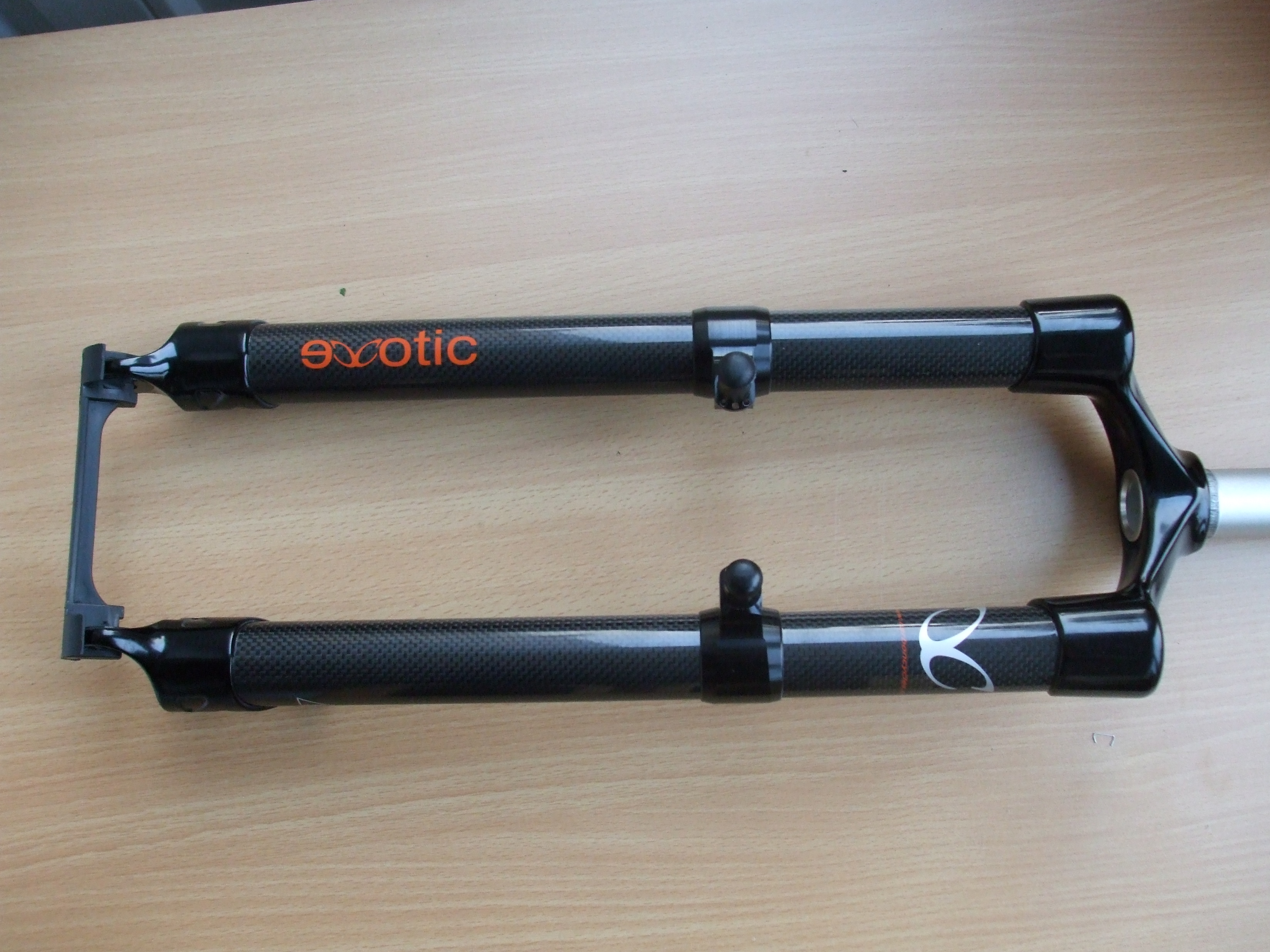 Carbon bike fork